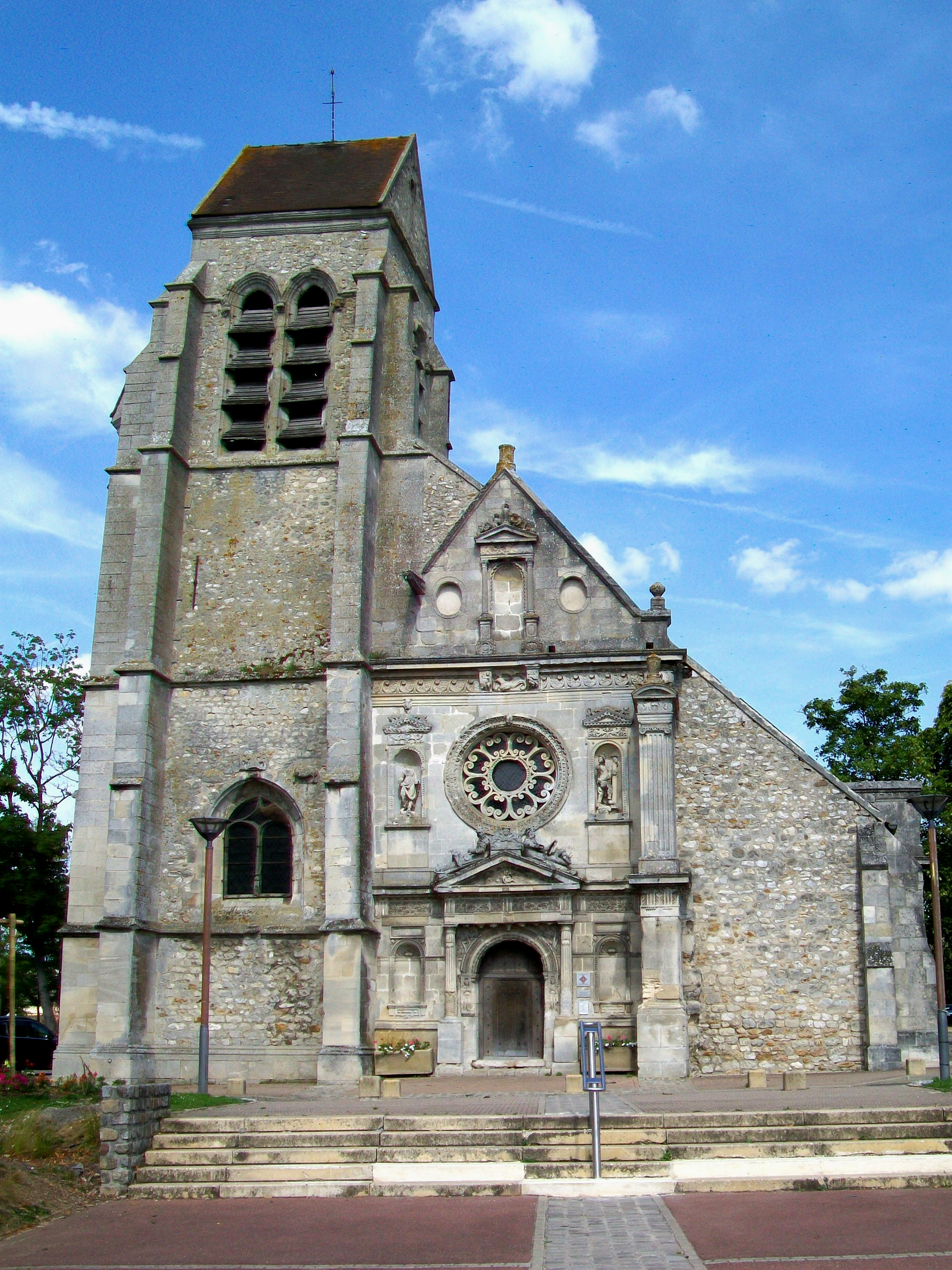 L'église Notre-Dame, façade ouest, chef d'œuvre de la Renaissance du XVIe siècle.